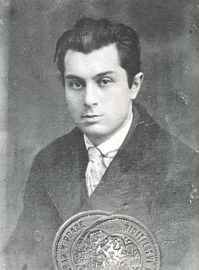 Johannes Urzidil (1896 - 1970), Pražský, německy píšící spisovatel, básník, esejista a historik umění.